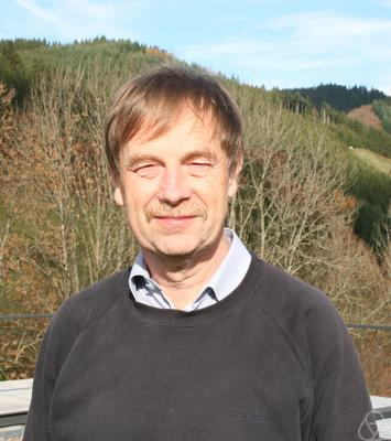 Foto di Herbert Spohn